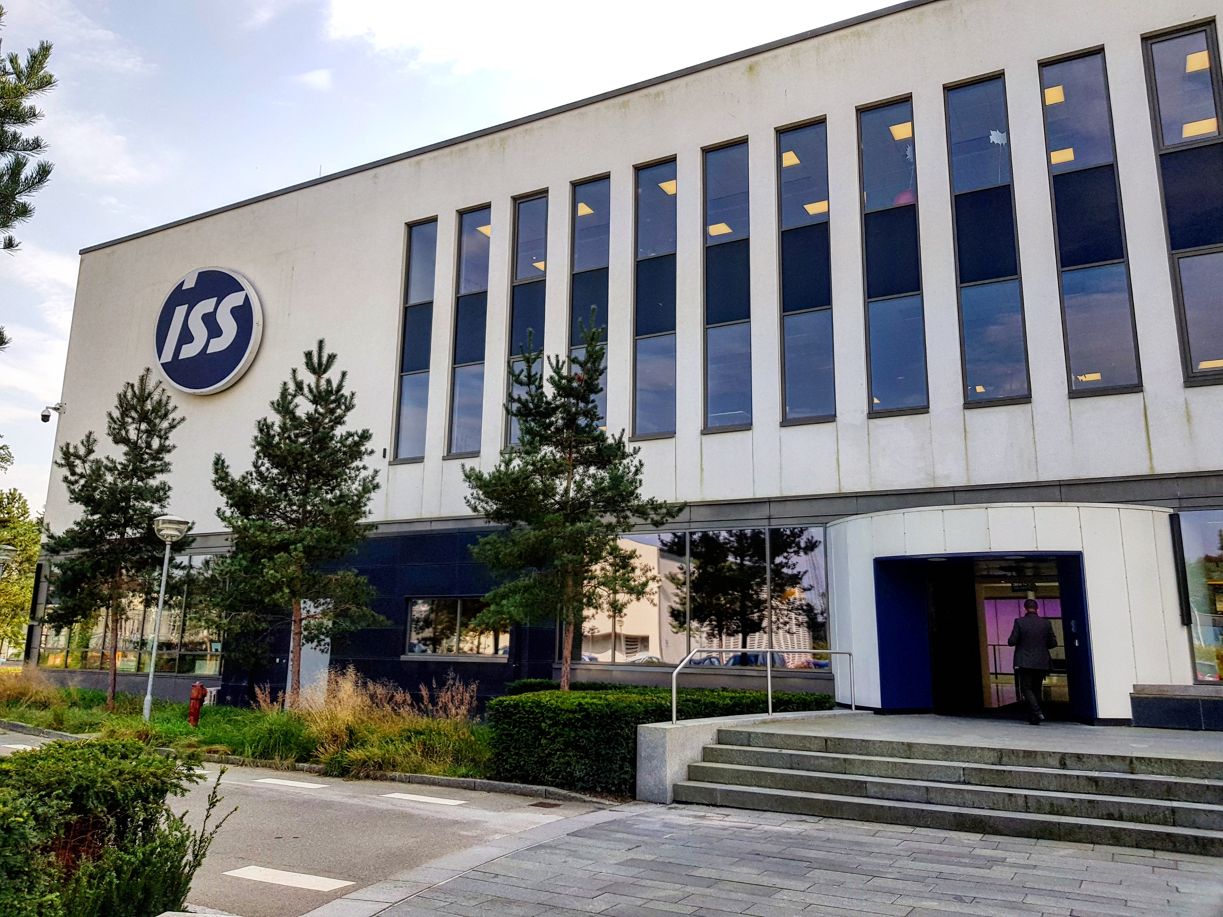 Oficines centrals d'ISS a Dinamarca